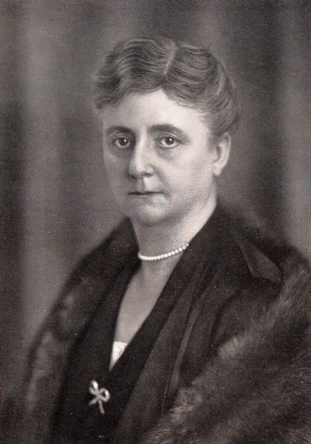 Porträt der Papierfabrikantin Olga Zander